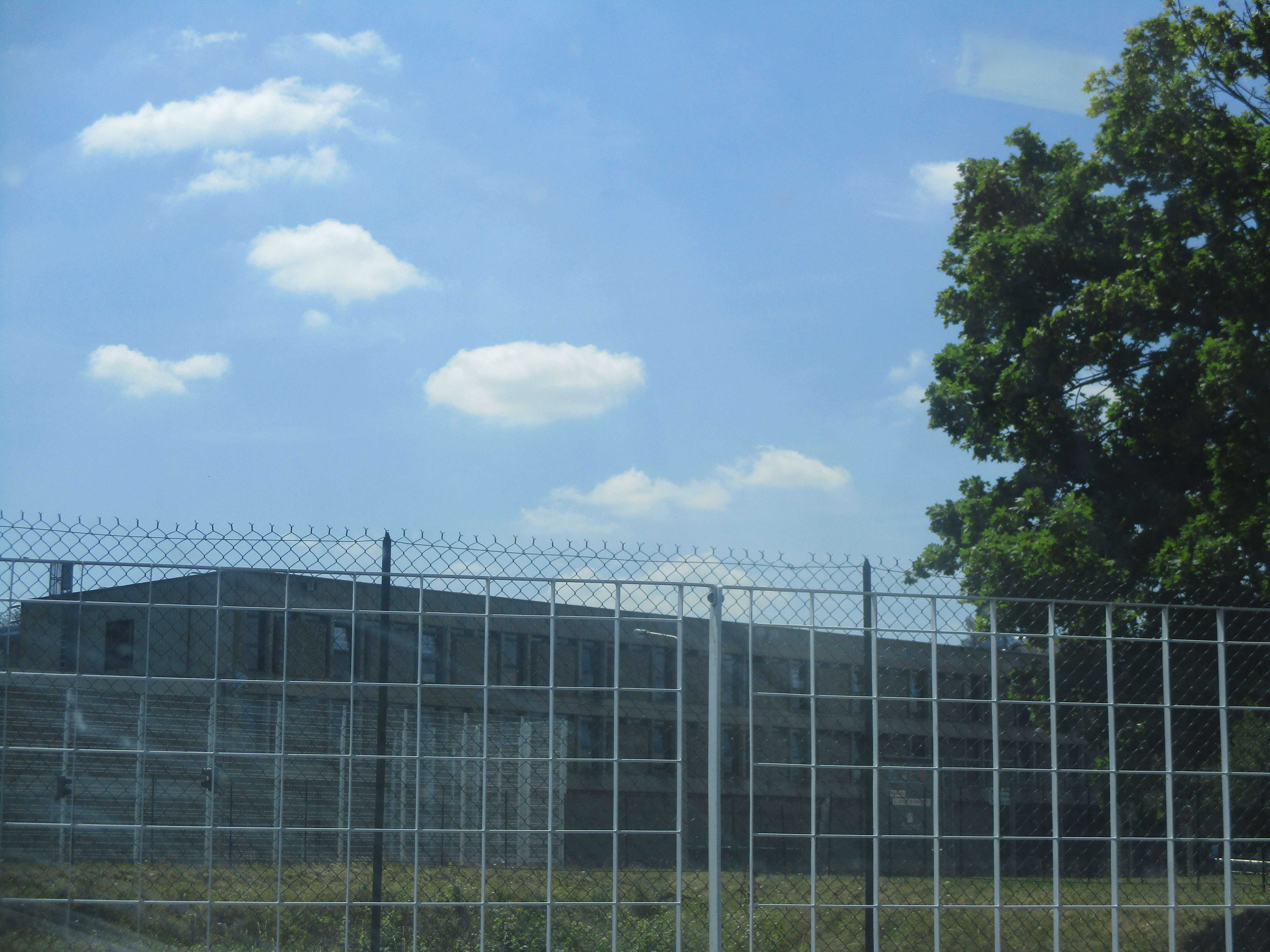 Maison d'arrêt de Fleury-Mérogis. Aile administrative.